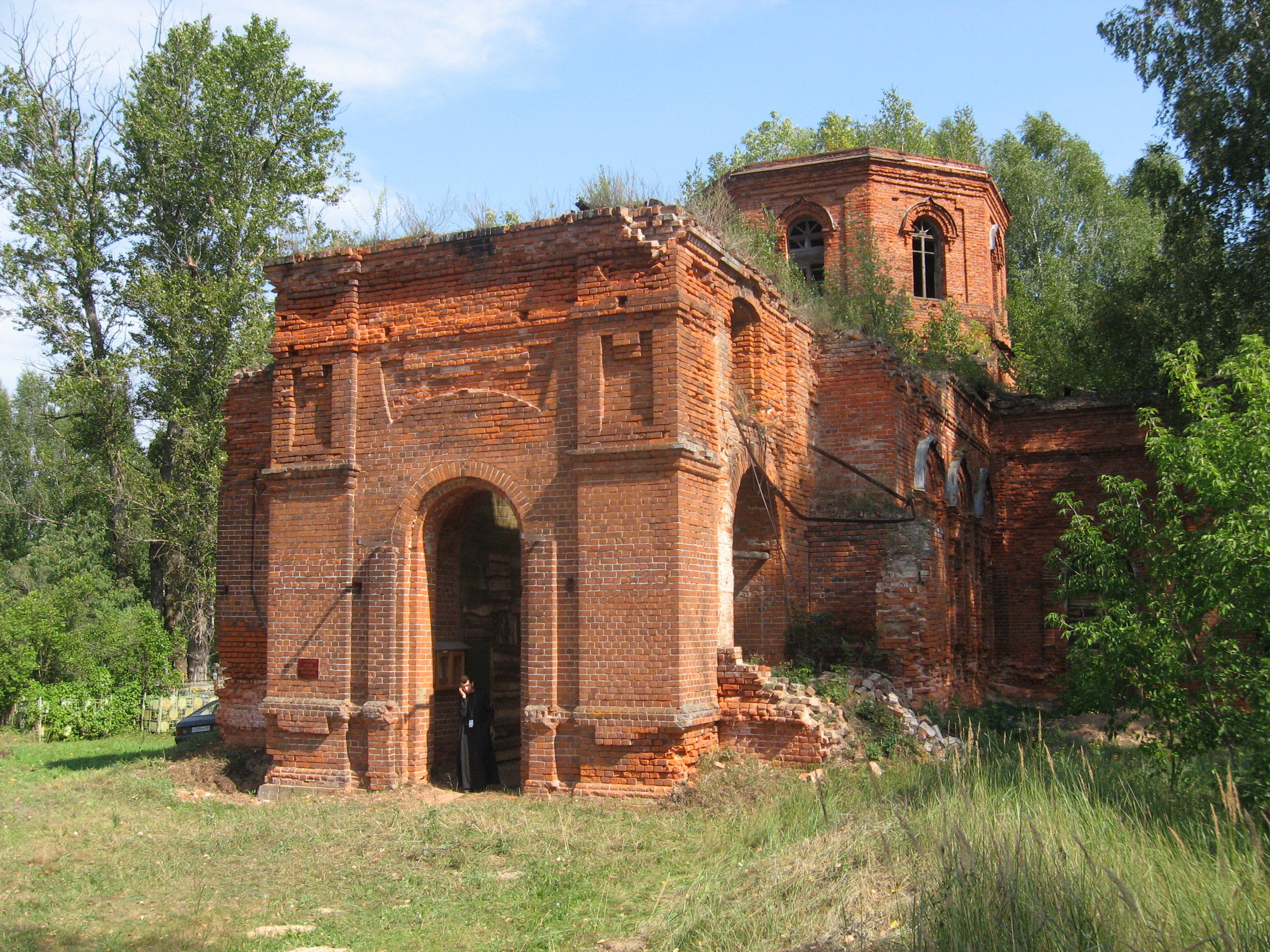 Никольский Храм с.Жабки Егорьевского района